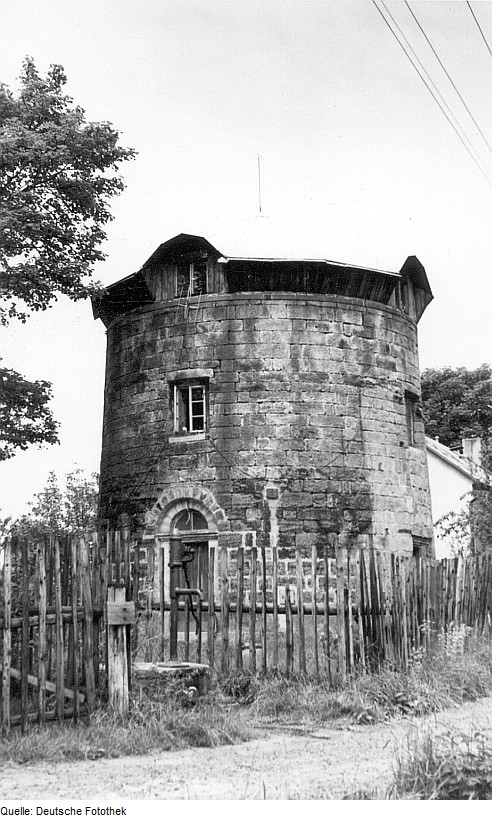 Original image description from the Deutsche Fotothek Arnoltice (Arnsdorf). Turmholländer